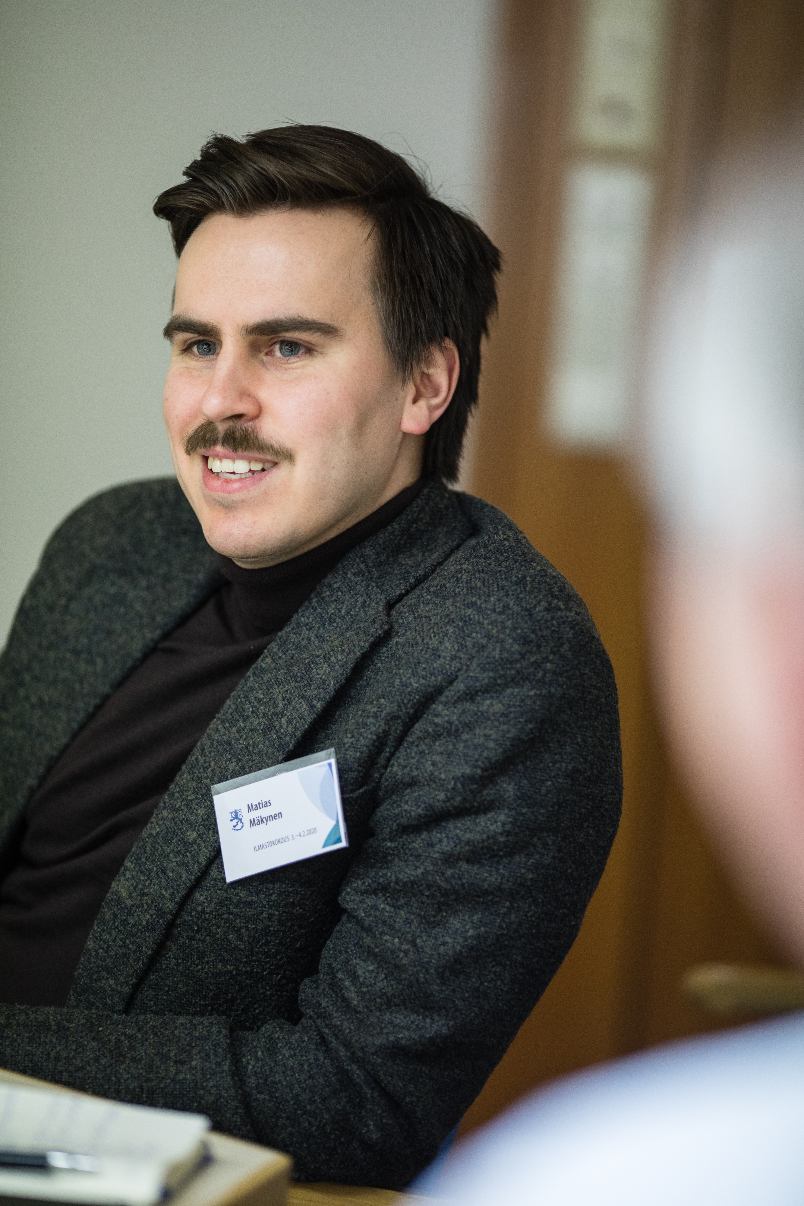 Hallitus ja hallituspuolueiden eduskuntaryhmät kokoontuivat yhteiseen ilmastokokoukseen Helsingin Vuosaareen. © Laura Kotila | valtioneuvoston kanslia